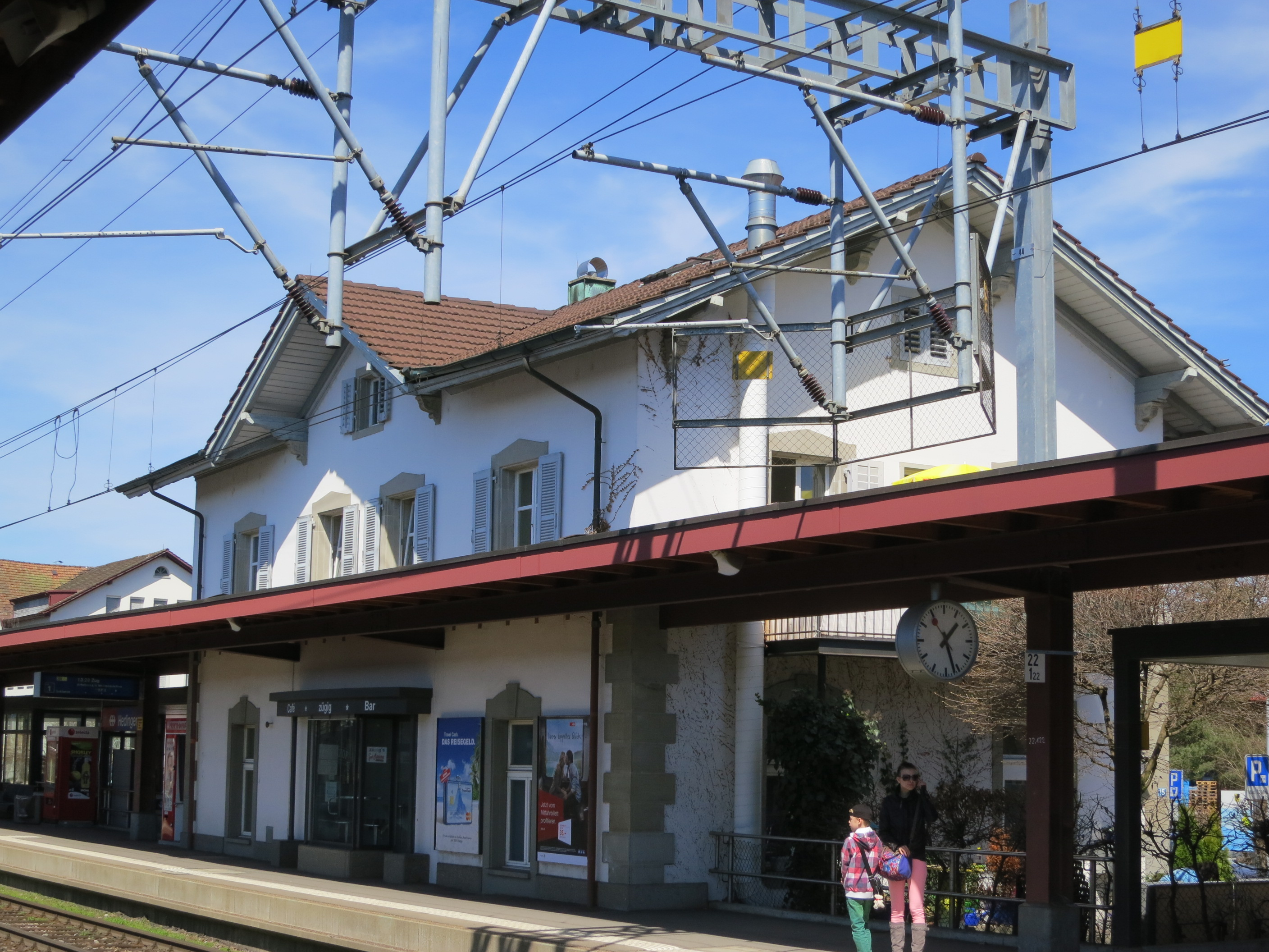 Bahnhof, Hedingen ZH, Schweiz